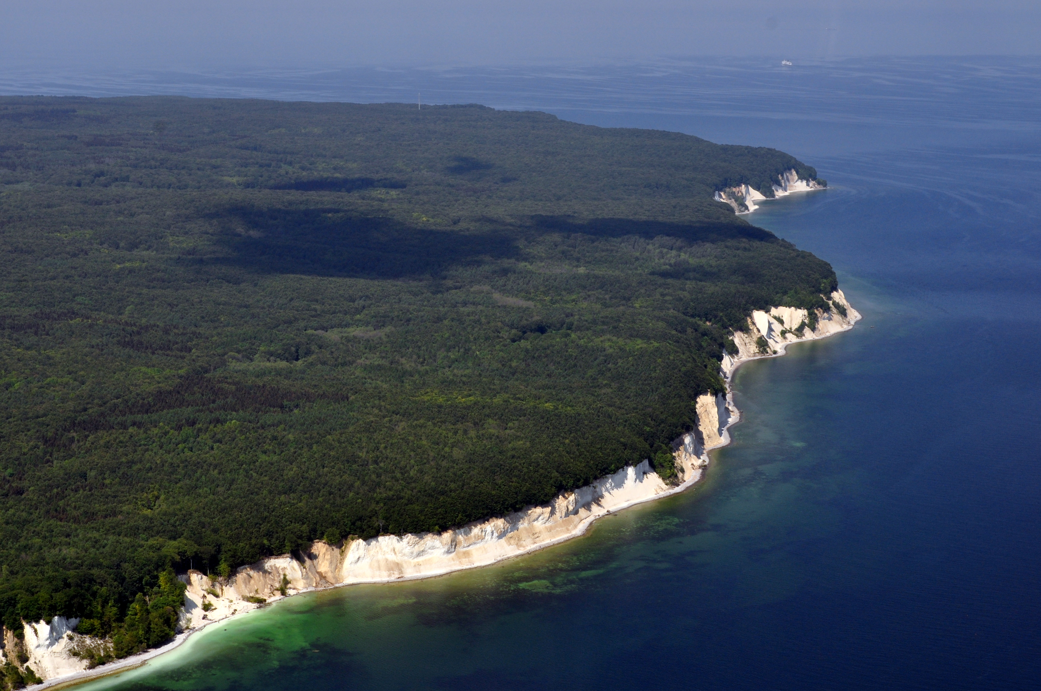 Die Bilder wurden von mir während eines einstündigen Rundflugs ab Flugplatz Güttin am 21. Mai 2011 aufgenommen. Die Bildbeschreibung steht im Dateinamen. Aufgenommen mit einer Nikon D5000 durch das Seitenfenster des Flugzeugs.